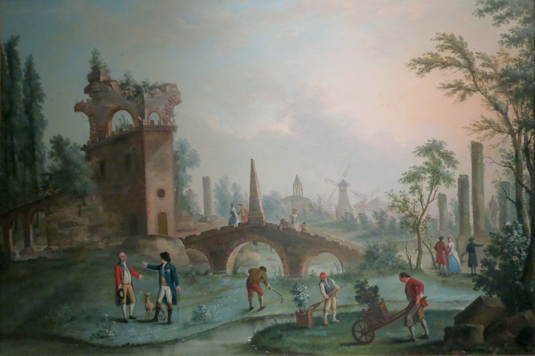 Vue des jardins de Monceau, la remise des clefs au duc de Chartres